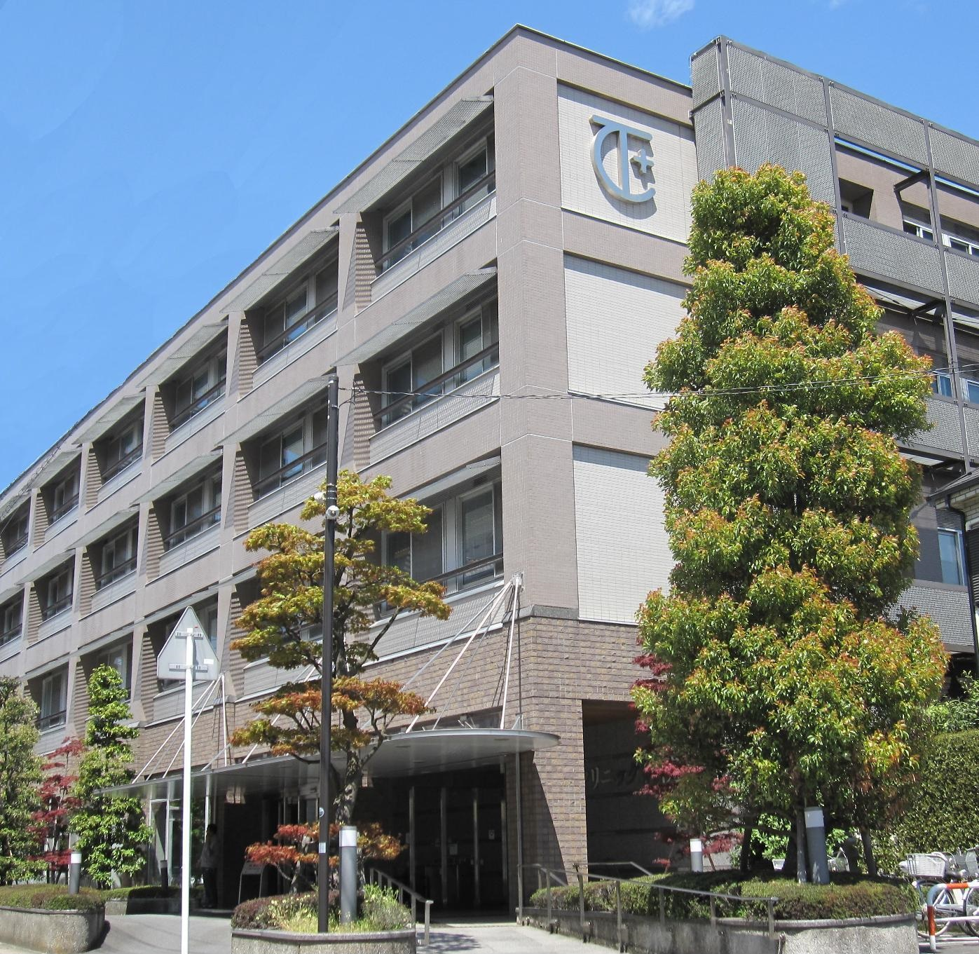 東葛クリニック病院本館